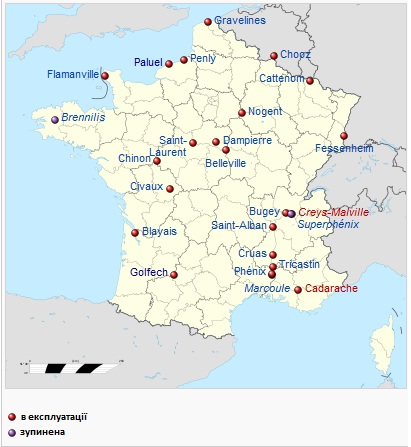 АЕС Франції